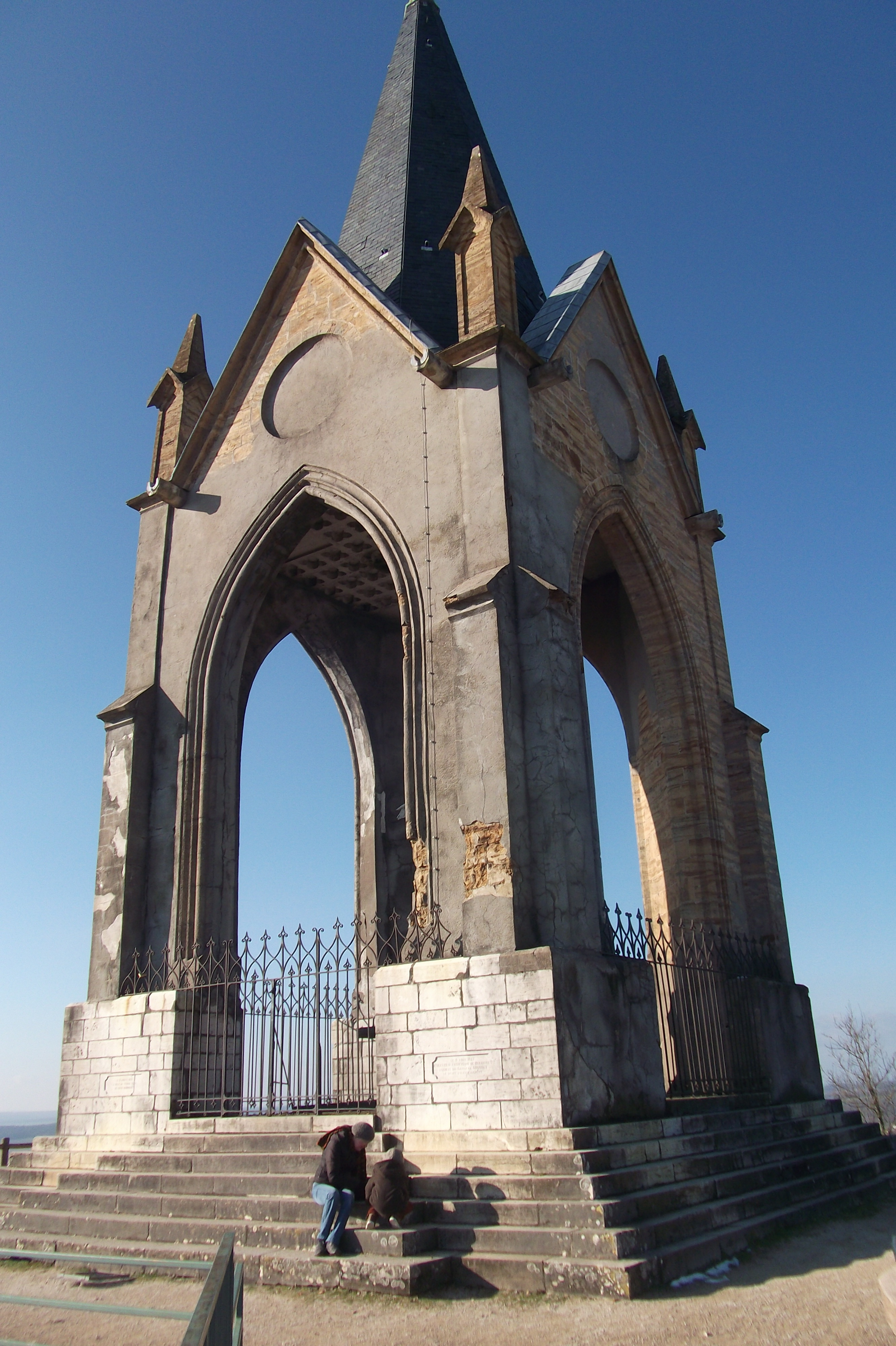 La chapelle Notre-Dame-de-la-Motte de Vesoul